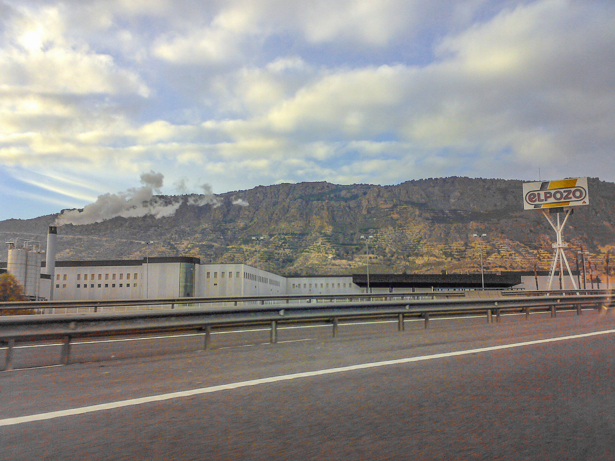 Fábrica de El POZO en Alhama de Murcia, Región de Murcia (España). Fotografía realizada desde un vehículo en la Autovía A-7